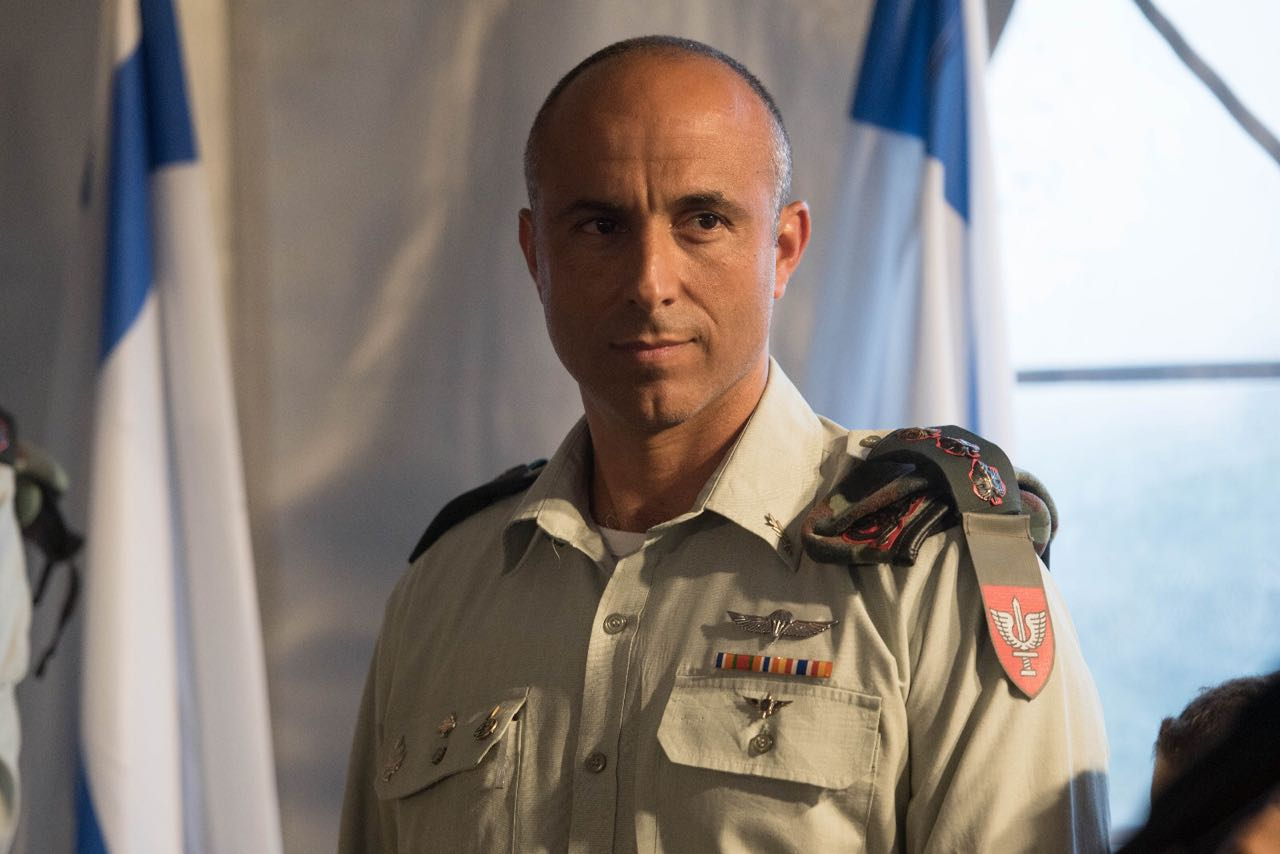 אלוף משנה ציון רצון, מפקד חטיבת כפיר.